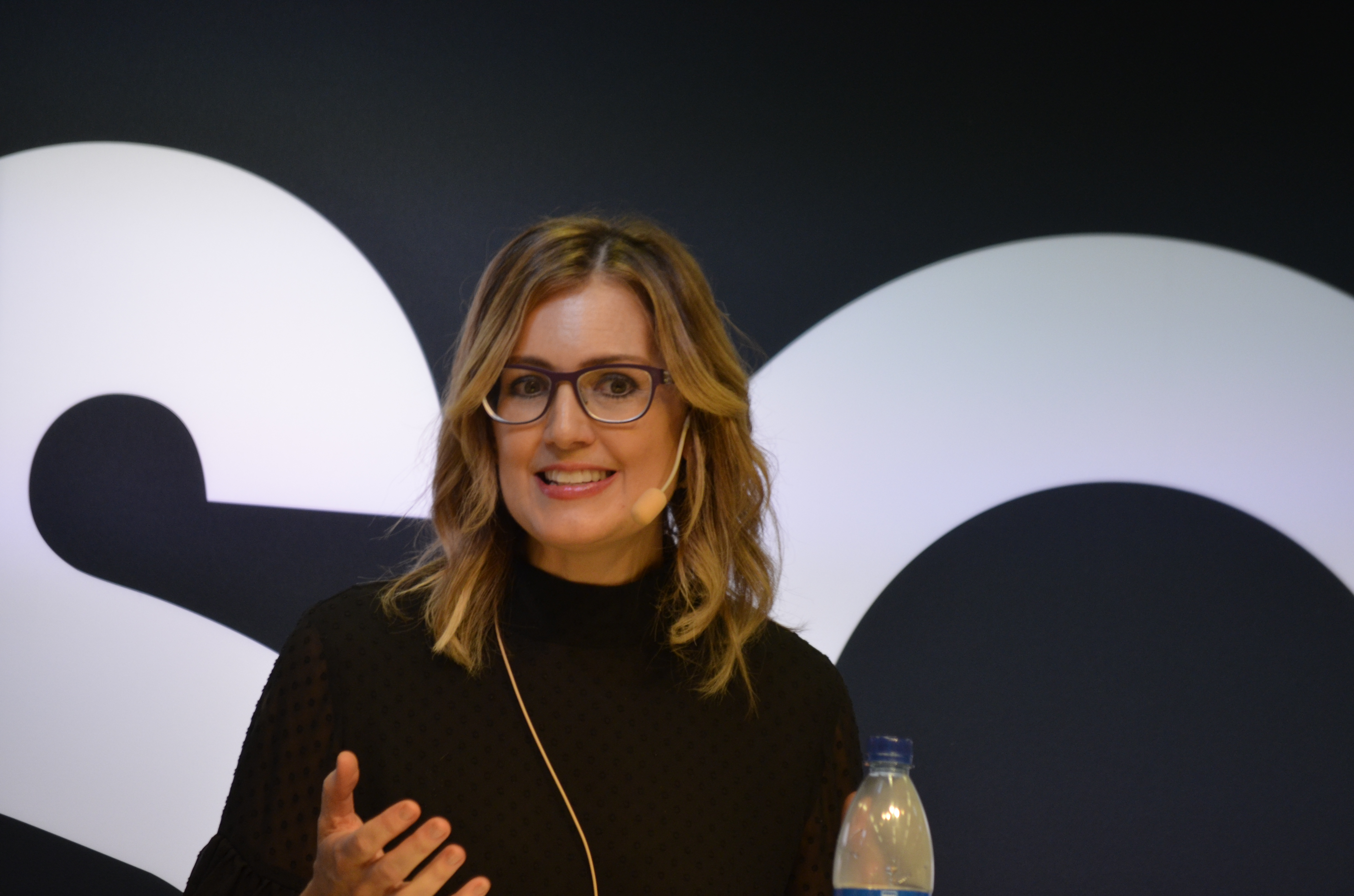 Jennifer Niven Bokmässan Göteborg 2017